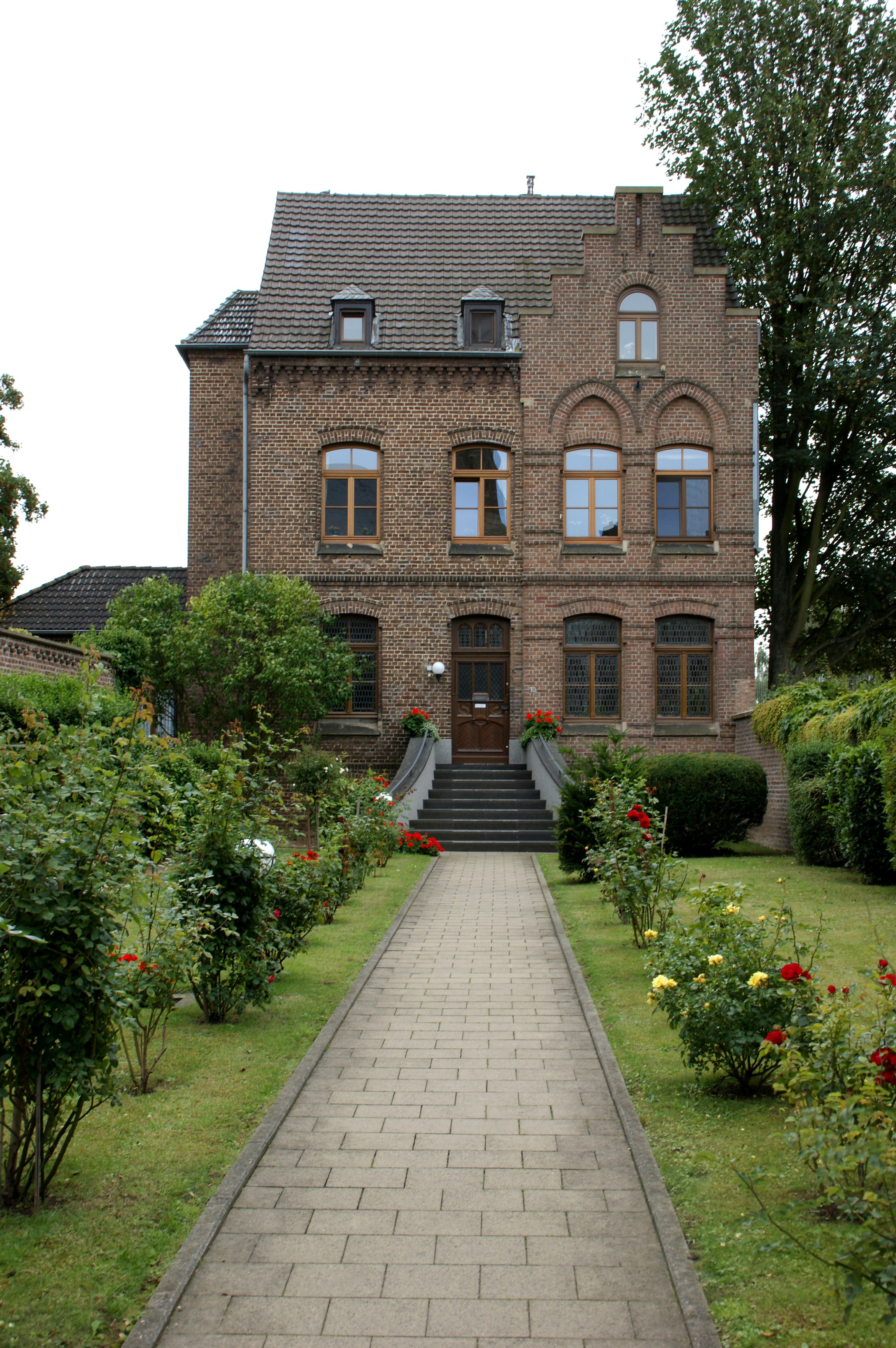 Denkmal Katholisches Pfarrhaus in Arnoldsweiler